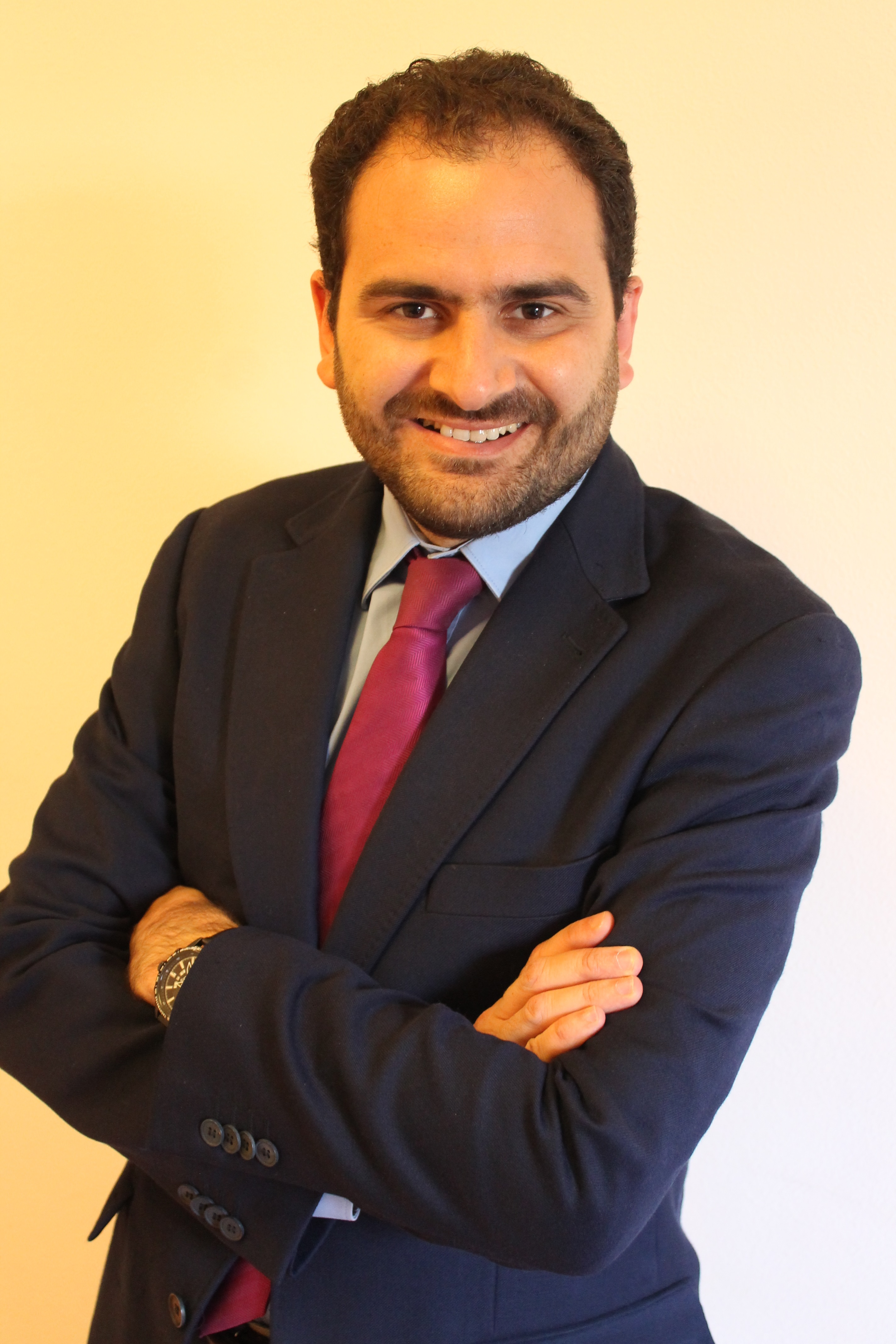 Fotografía de Fernando Sánchez Costa en 2015